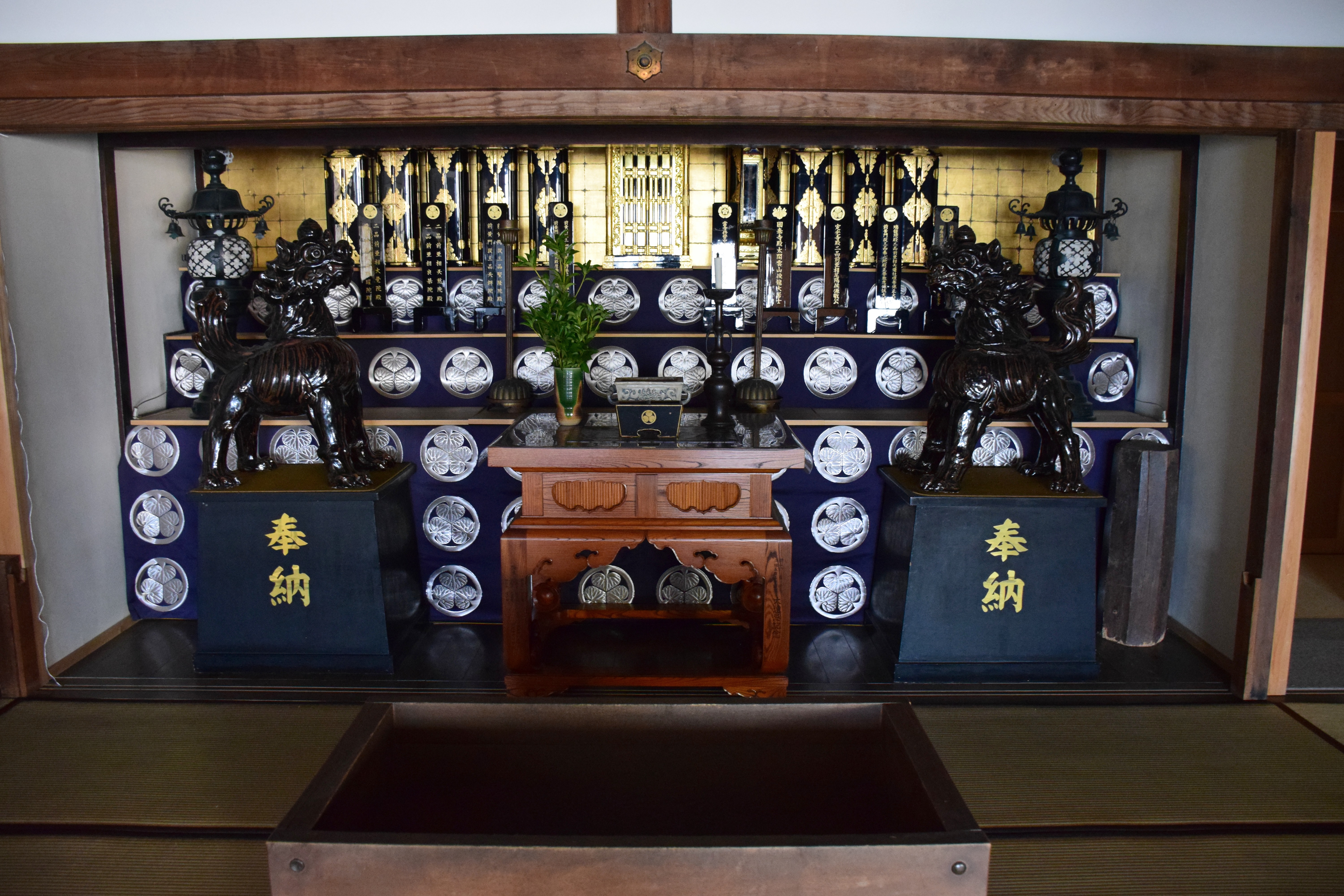 本堂にある位牌